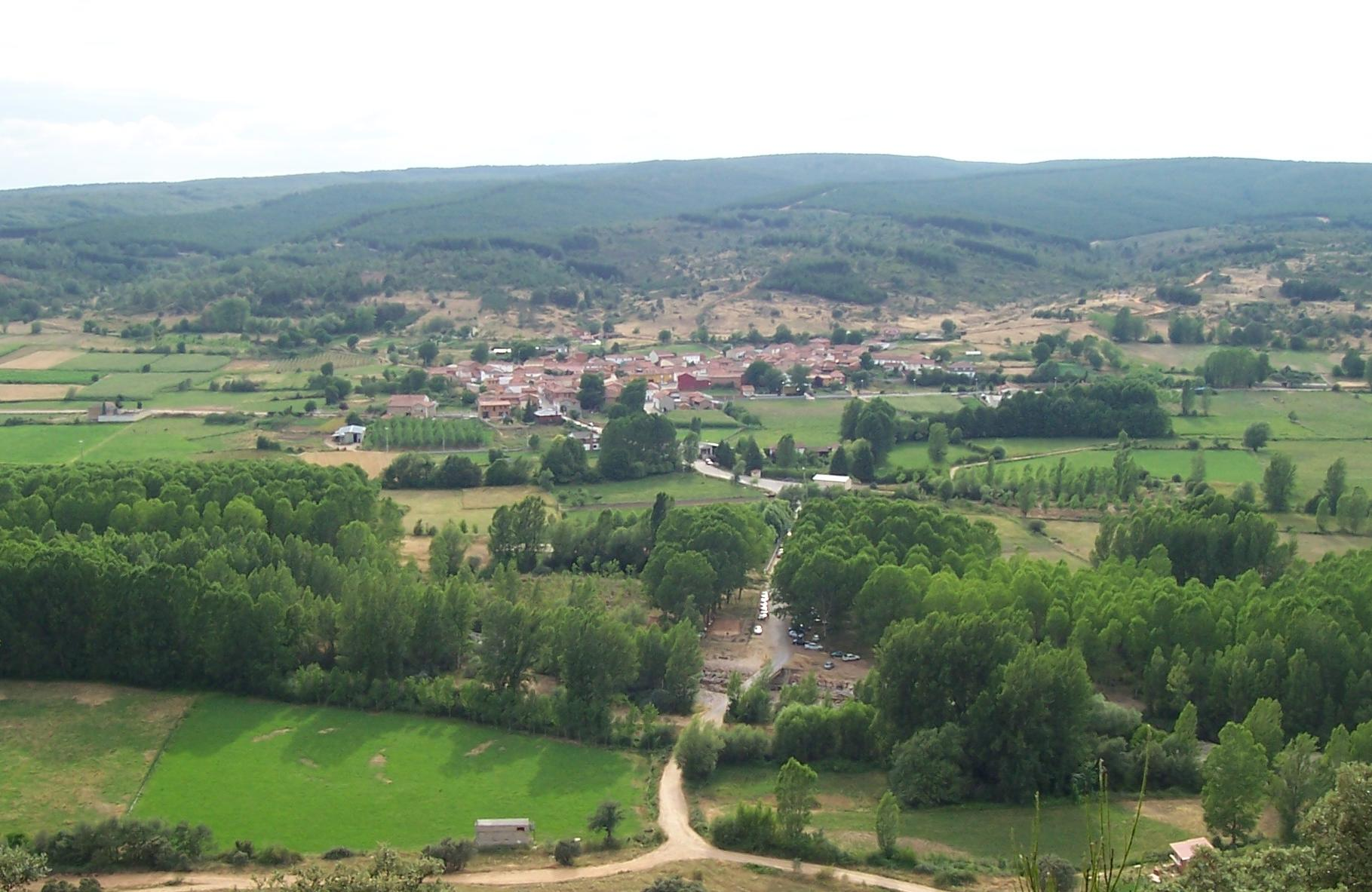 El pueblo de Santa Colomba de Curueño, visto desde la ermita Santa Ana.